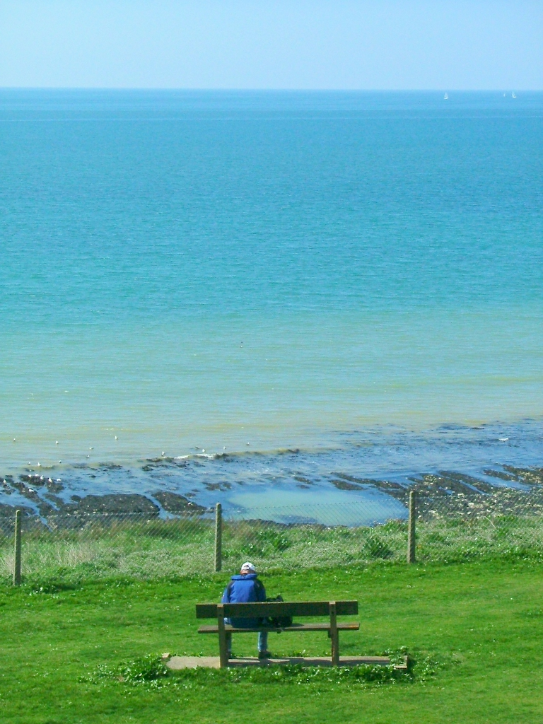 Contemplation